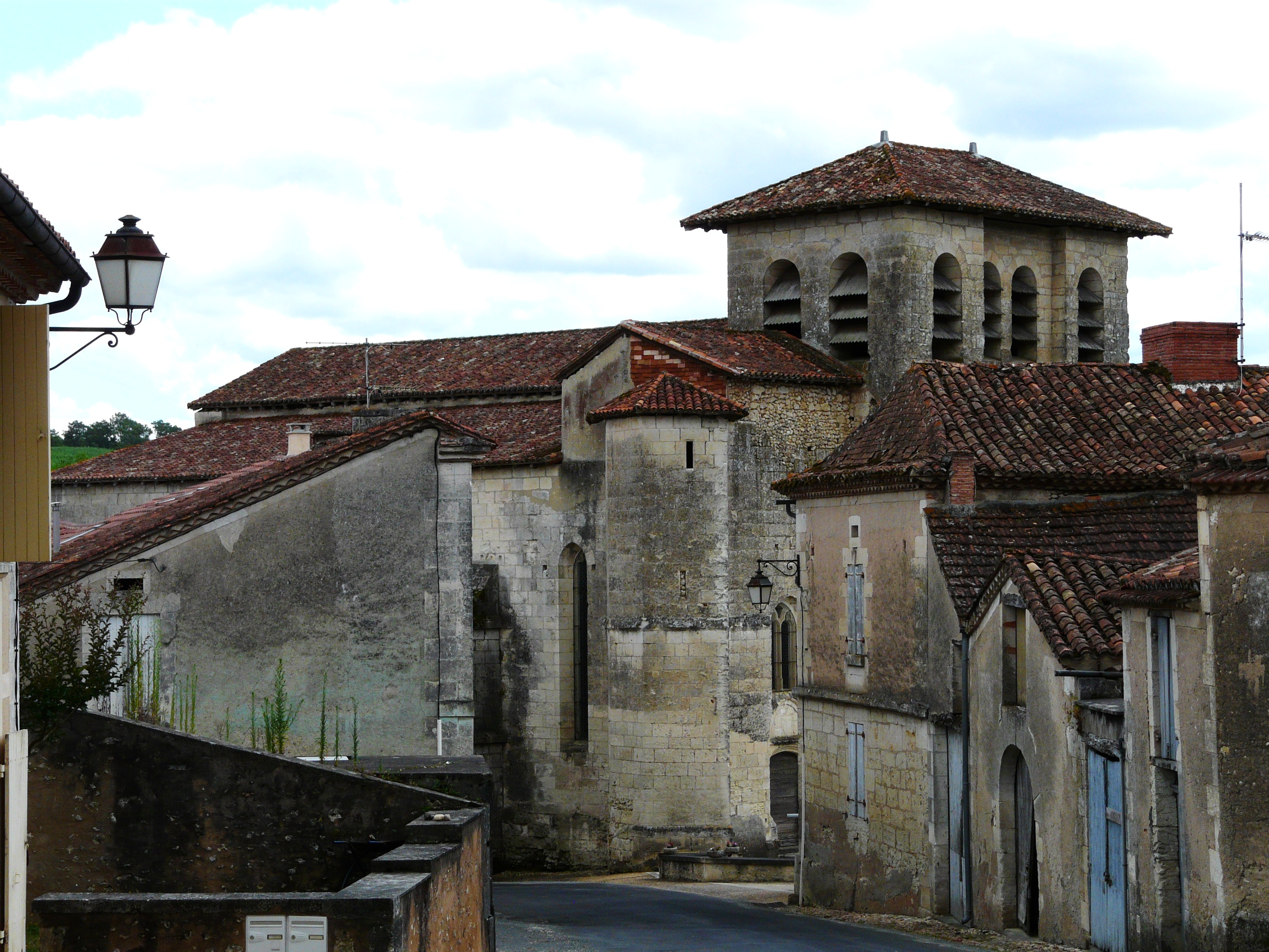 Église Saint-Pierre-ès-Liens dans le village de Chantérac, Dordogne, France